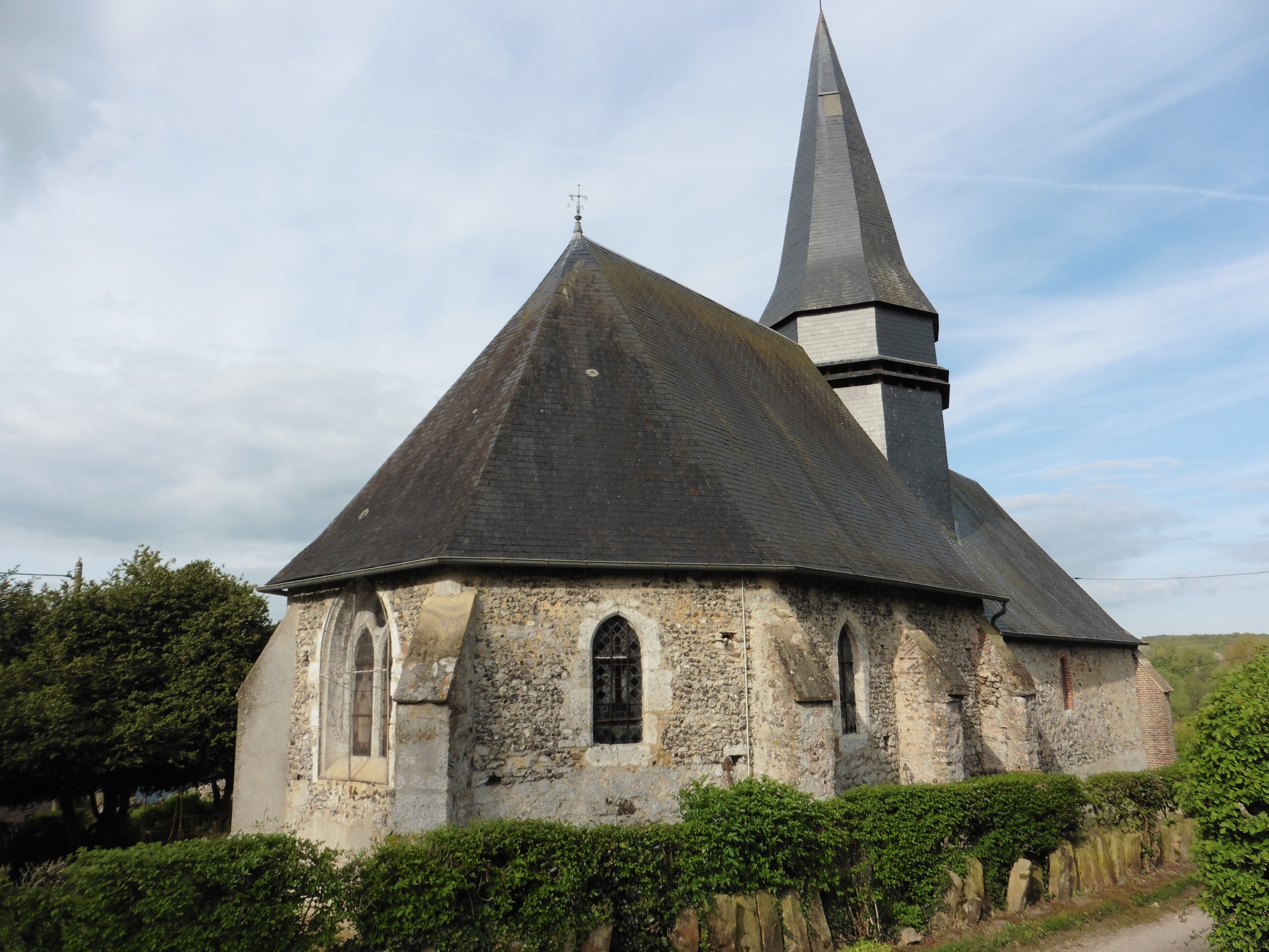 Le chevet de l'église d' Héricourt-sur-Thérain village de Picardie France